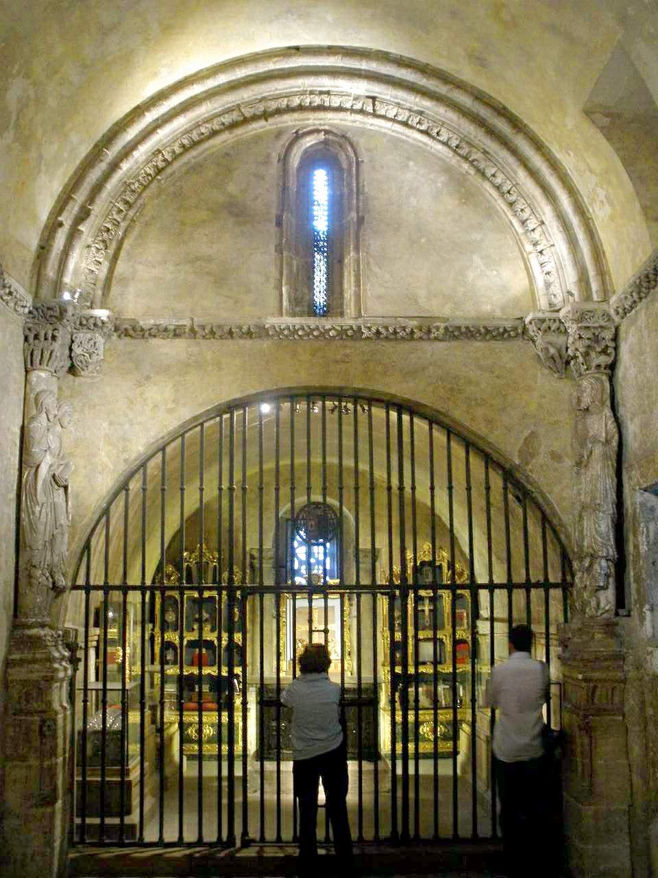 Cámara Santa de la Catedral de Oviedo (Asturias)